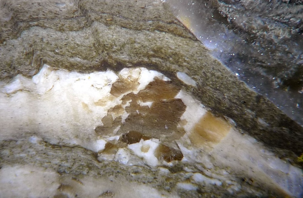 Fontarnauita, trobada a la regió d’Anatòlia, a l’oest de Turquia